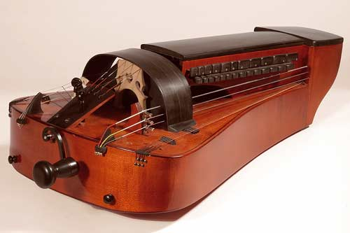 Alto-Drehleier von Wolfgang Weichselbaumer.